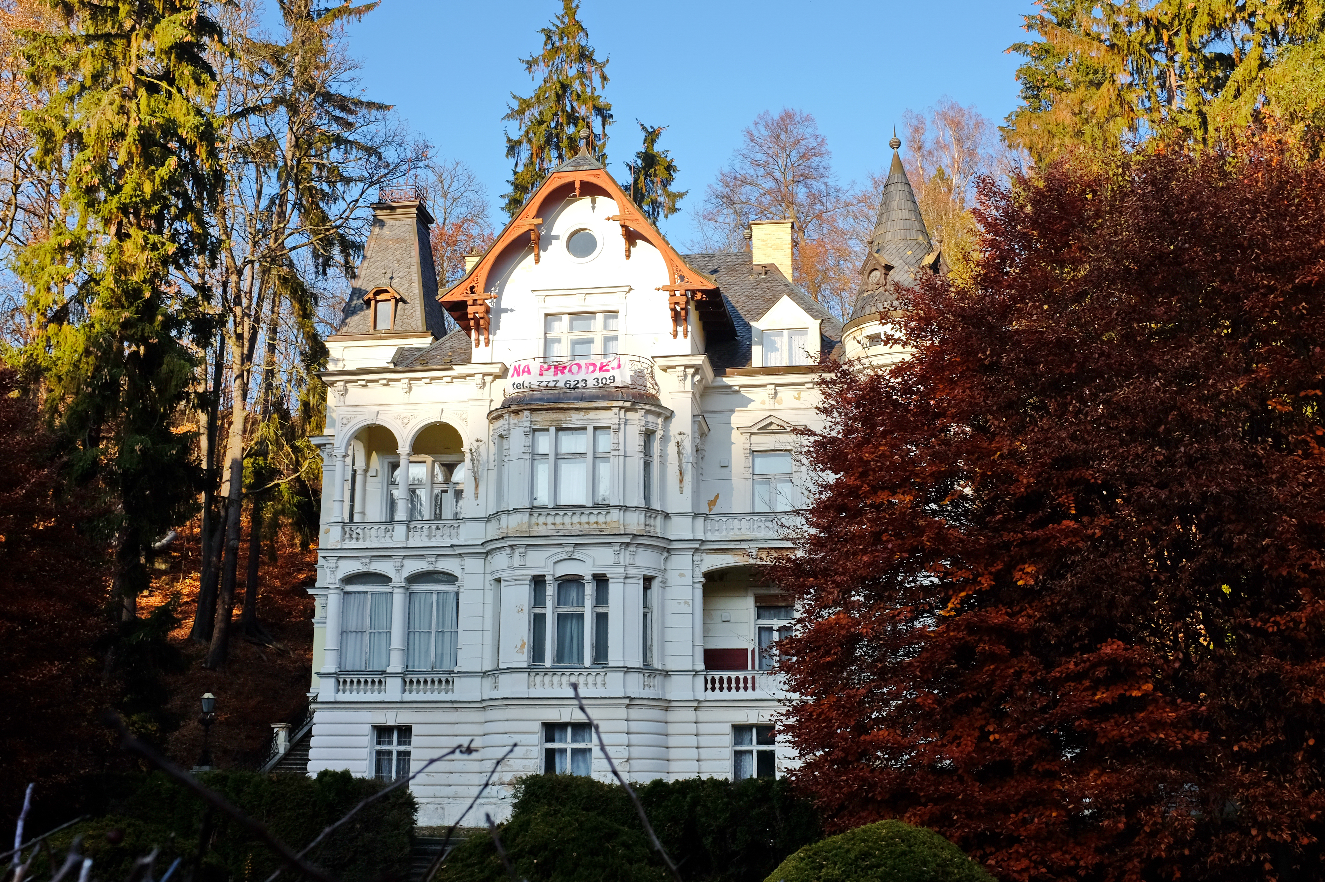 Lázeňský dům Marghareta, U Imperiálu 1048/2, Karlovy Vary.